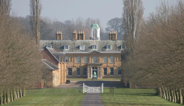 Stratfield Saye, Berks